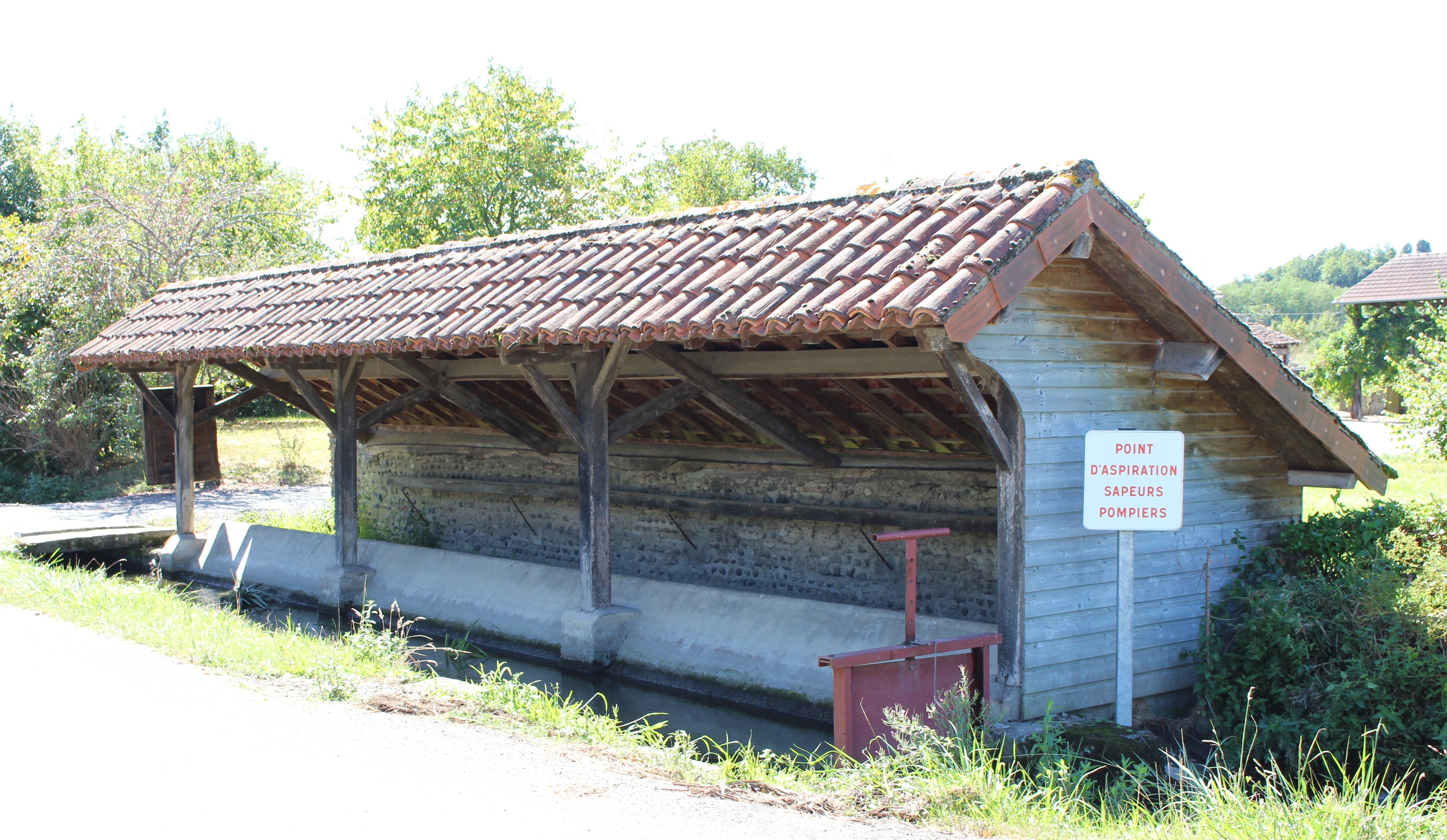 Lavoir de Lafitole (RD55) (Hautes-Pyrénées)